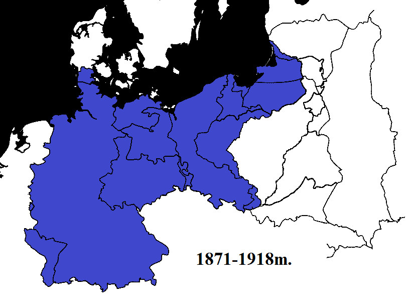 Vokietijos imperija, suvienyta 1871m., dominuoja Prūsija